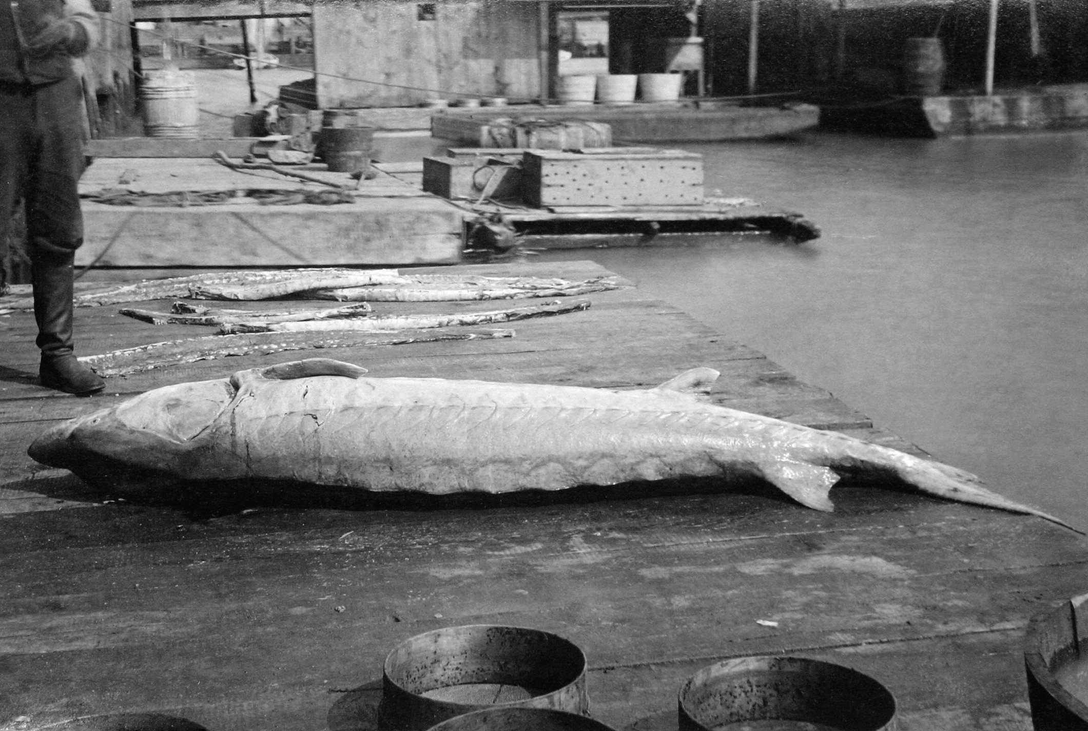 Acipenser sturio (female)